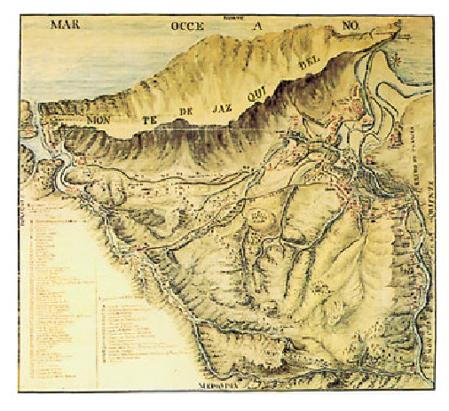 Lezoko mapa topografikoa. Diego Pérez Martín. 1803. (Real Chancillería de Valladolid-eko Artxiboa).